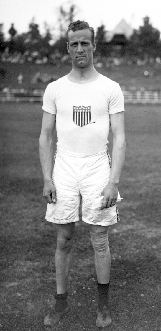 23-7-12, Reims, B. Adams, américain, saut en hauteur sans élan [portrait] : [photographie de presse] / [Agence Rol]